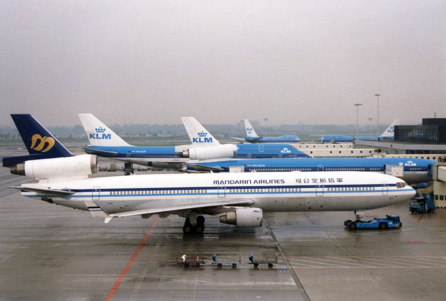 MD/DC11 der Mandarin Airlines(B-151)